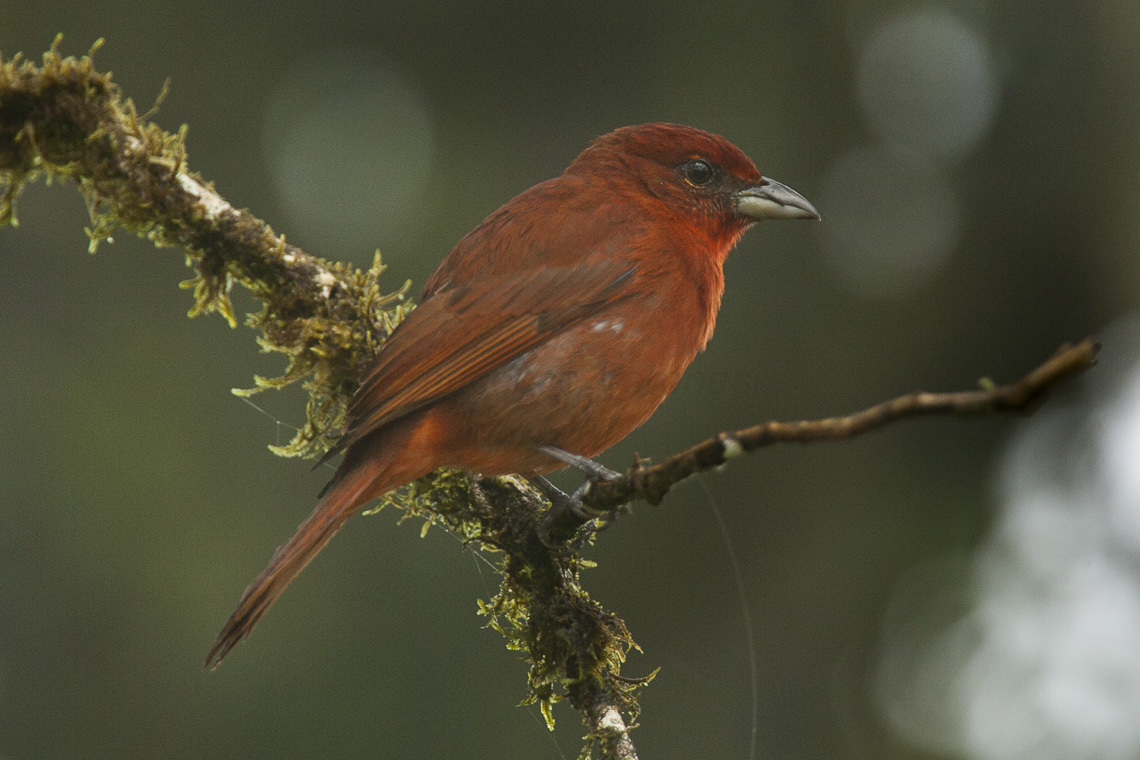 Tooth-billed Tanager Piranga lutea, Panama_H8O9093